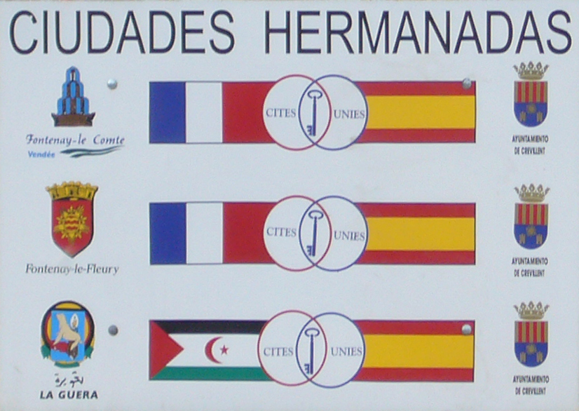 Cartel, en la entrada de Crevillente (N-340, desde Elche), que muestra las ciudades con las que está hermanada: Fontenay-le-Comte (Francia) Fontenay-le-Fleury (Francia) La Güera (Sáhara Occidental)